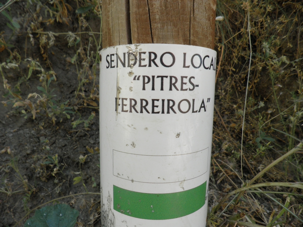 La Taha